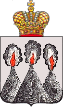 Armes de l'oblast du Kamtchatka dans l'Empire russe